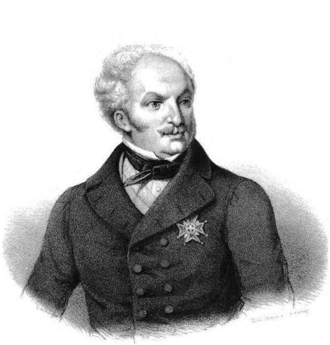 "Louis XVII, Roi de France et de Navarre". (Detail of file : Naundorff old.jpg)